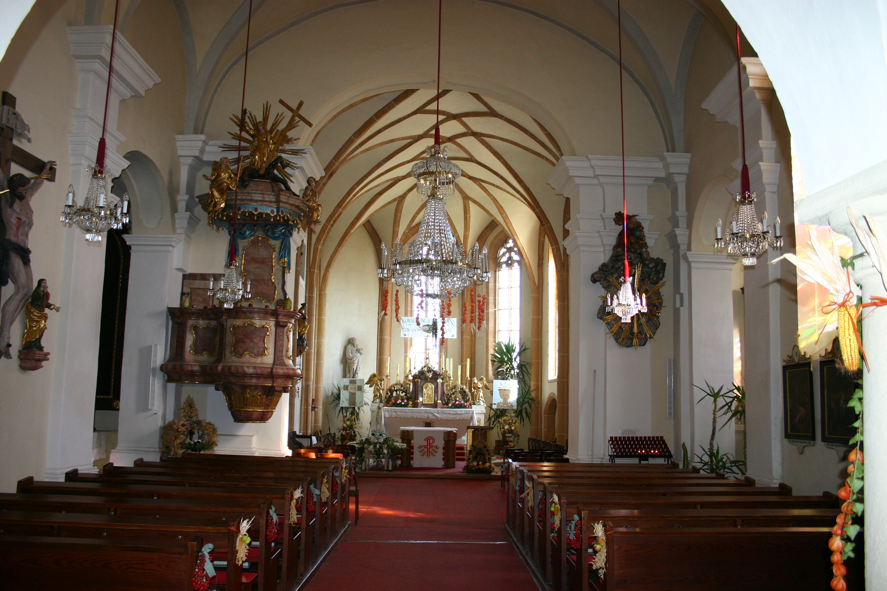 Unterfrauenhaid – Innenansicht der Pfarr- und Wallfahrtskirche